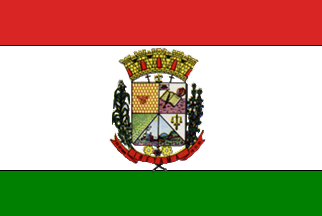 Bandeira Iretama Paraná